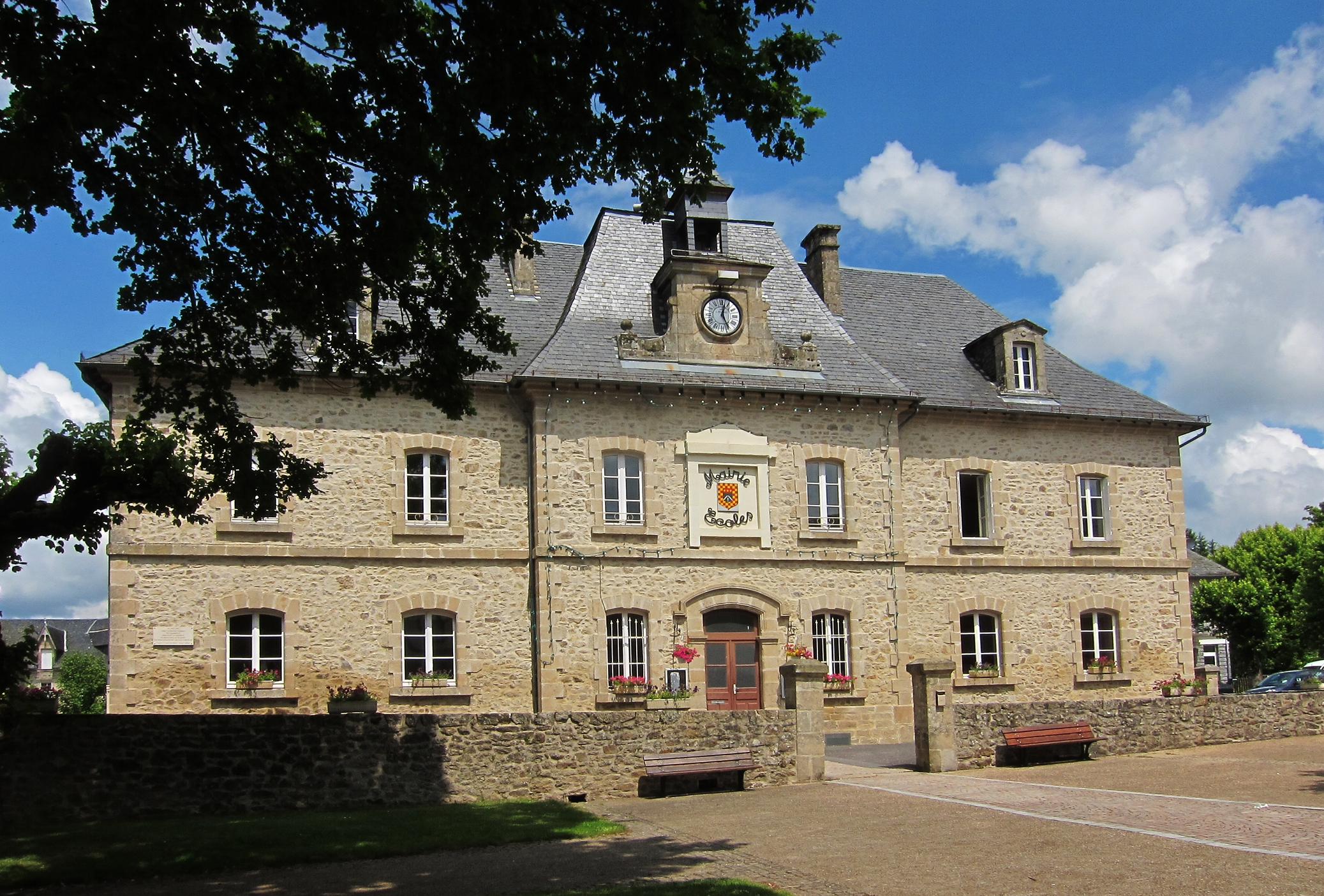 La mairie - écoles de Marcillac-la-Croisille (Corrèze).